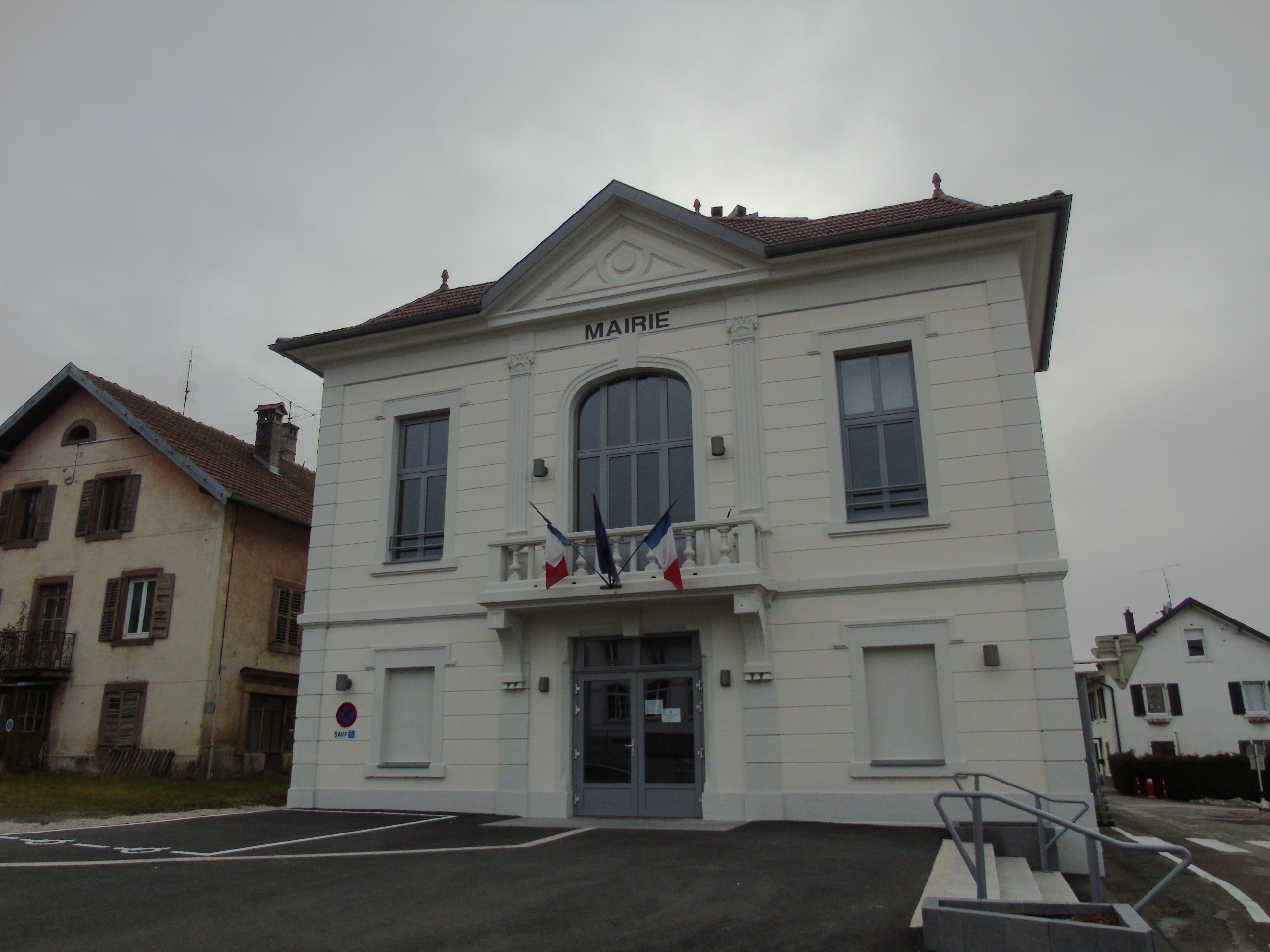 Mairie de Damprichard, Doubs, France